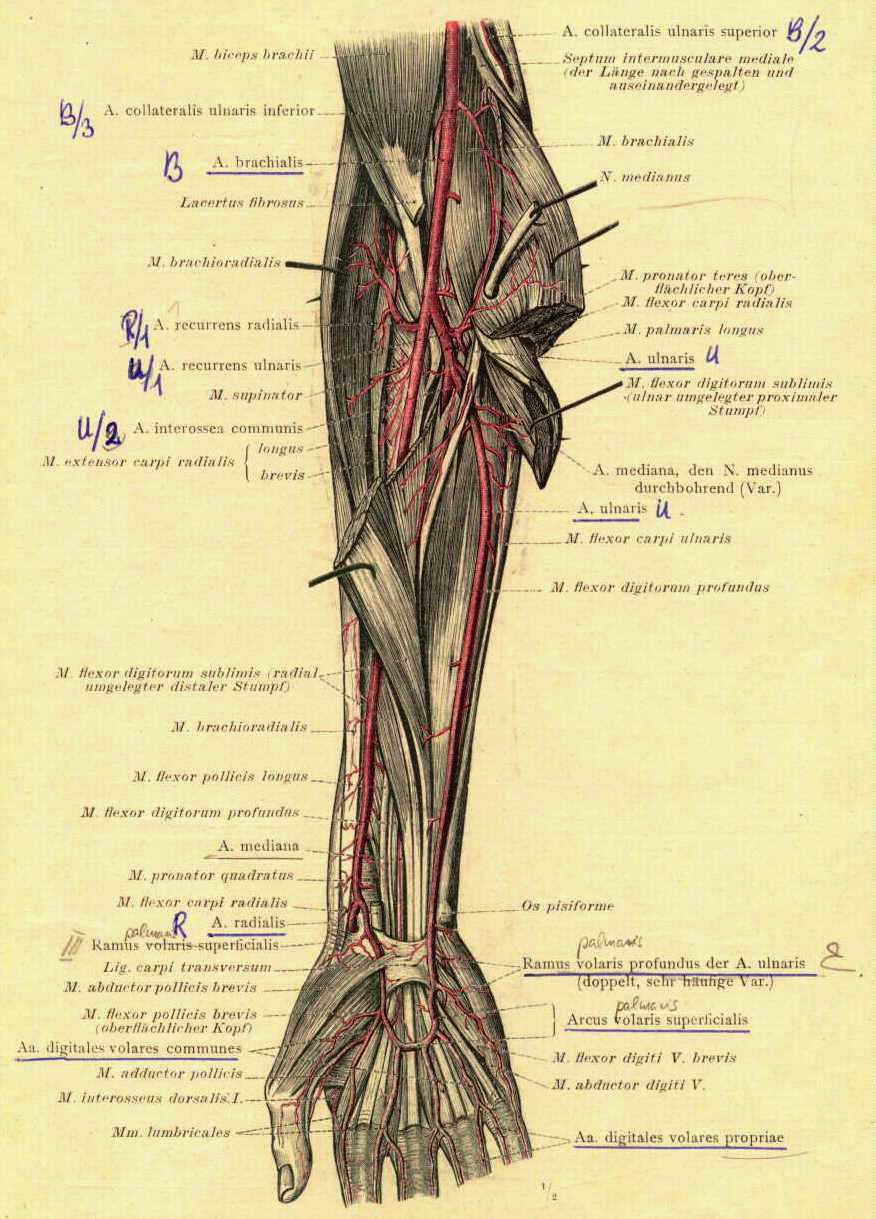 Az alkar ütőereinek singcsont oldali ábrázolása